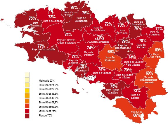 Pourcentage de la population favorable ou très favorable à la signalisation routière bilingue français/breton